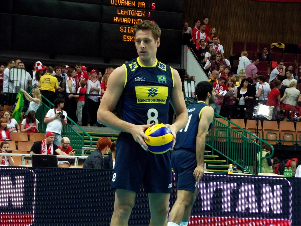 Zdjęcie zrobione podczas zawodów Ligi Światowej 2012 w katowickim Spodku.